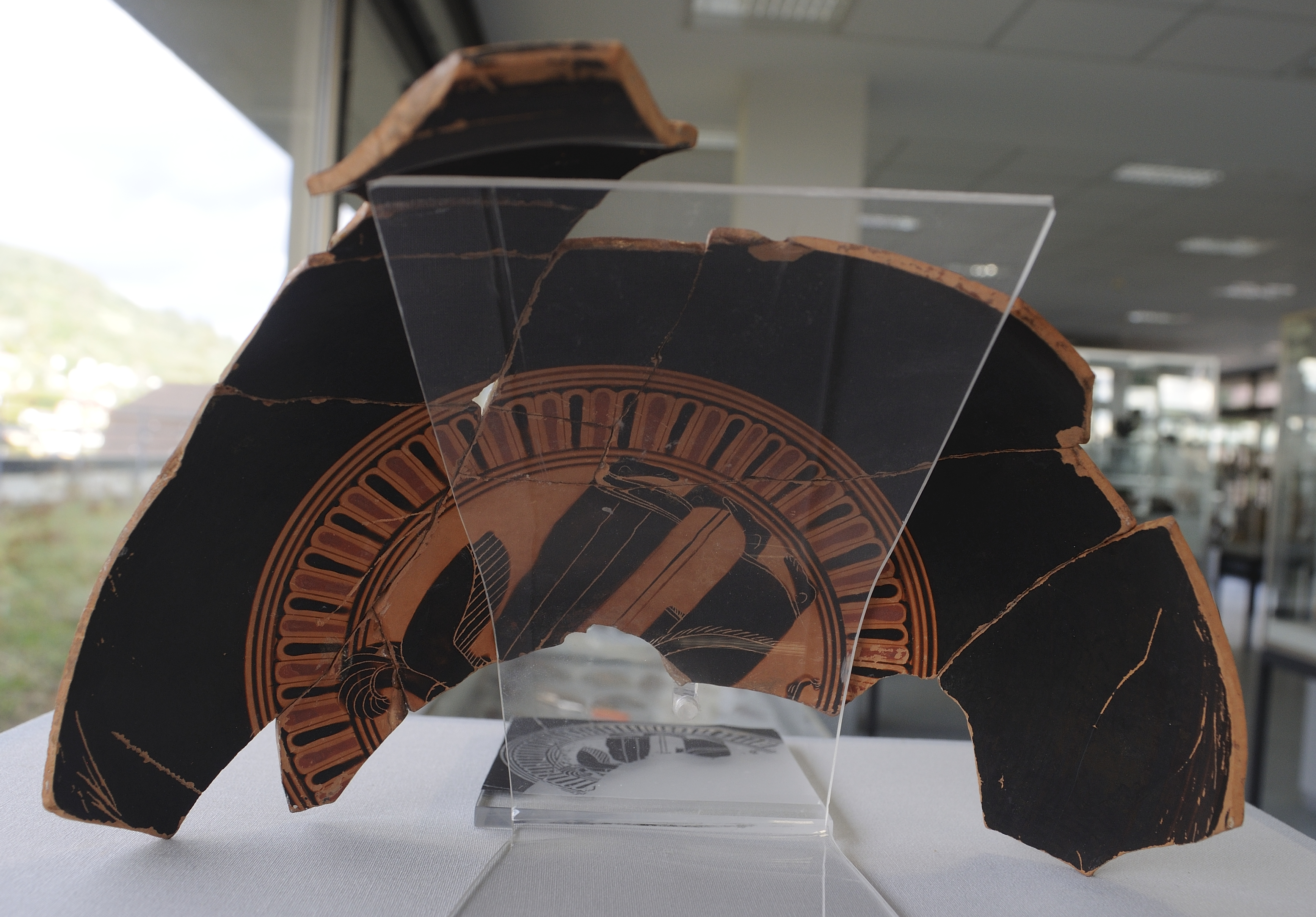 Objekt im Antikenmuseum der Universität Heidelberg.